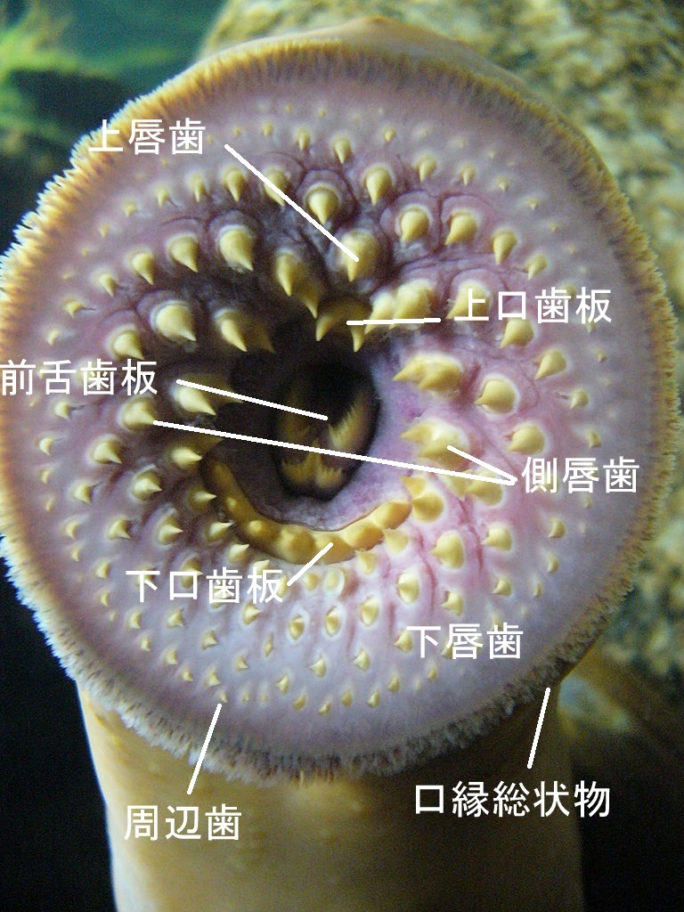 円口類のウミヤツメPetromyzon marinusの歯についての説明。Drow male氏がWikimedia Commons上にUploadしたものを改変（歯についての説明を日本語で付記）。